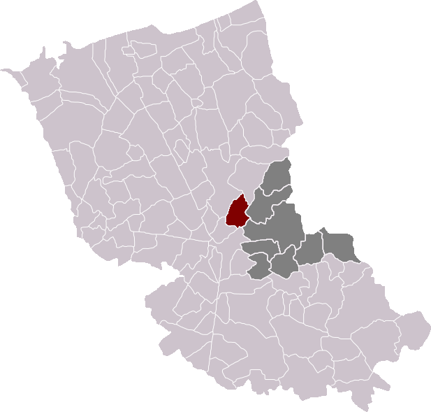 Locatie gemeente Oudezele in arrondissement Duinkerke. Zelfgemaakt. Location of Oudezeele municipality in the arrondissement of Dunkirk. Self made. Localisation de la commune d'Oudezeele dans l'arrondissement de Dunkerque. Fait moi-même.